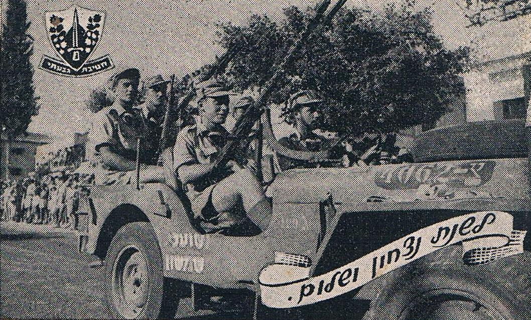 מצעד חטיבת גבעתי שהתקיים ברחובות בספטמבר 1948 בג'יפ מקדימה אלברט מנדלר לימים אלוף בצה"ל ולידו הנהג דוד סגל